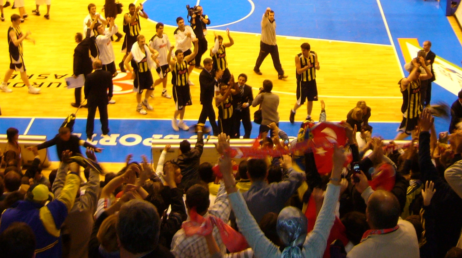 L'équipe turque de basket-ball du Fenerbace Ulkerspor lors d'un match Euroleague (Clermont-Ferrand)